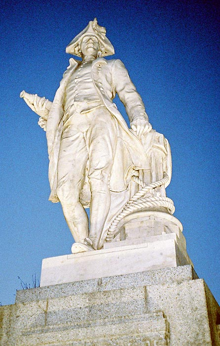 Christchurch, New Zealand 29 September 2004